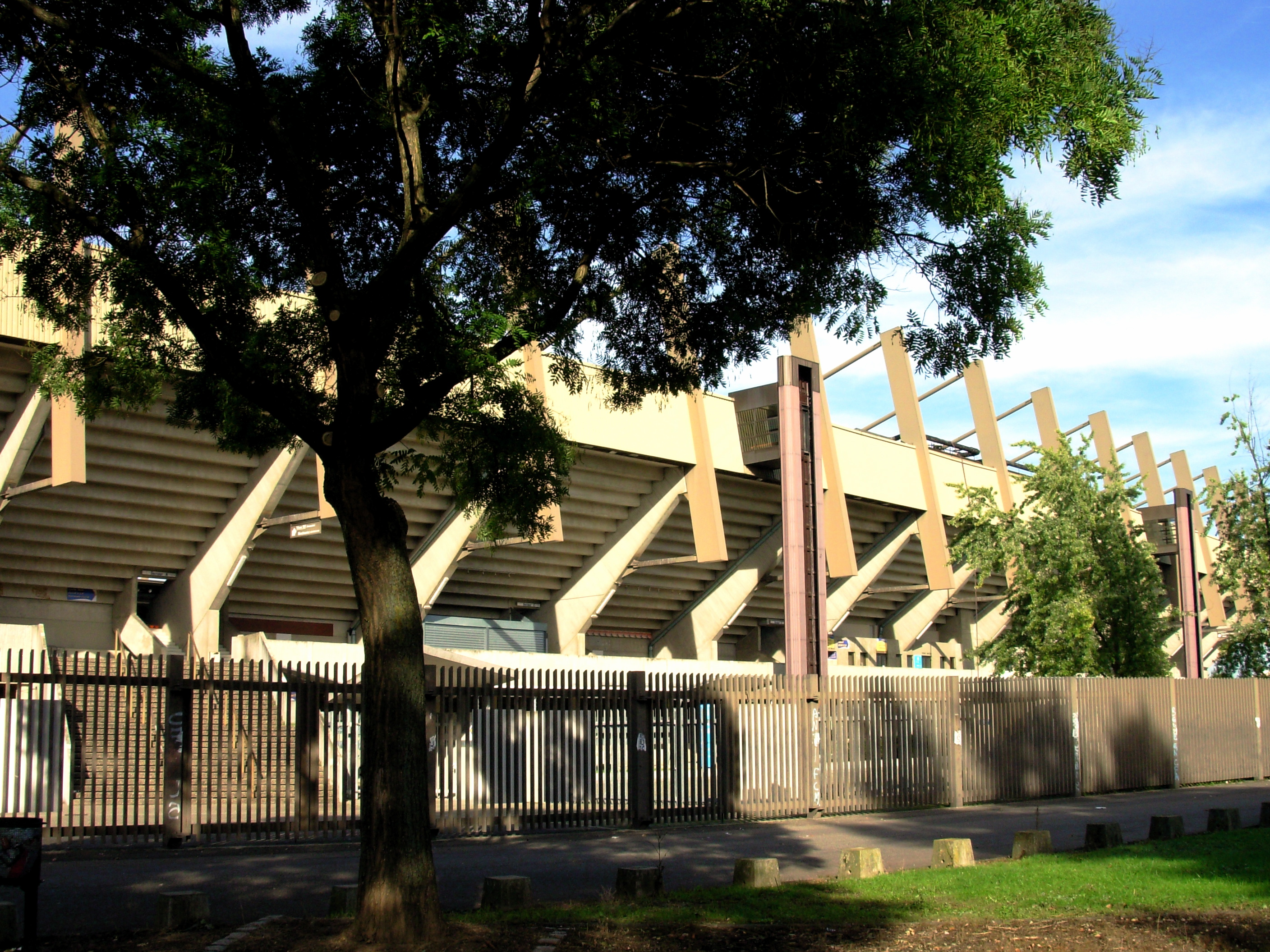 Stade de la Meinau, Strassbourg Fassade